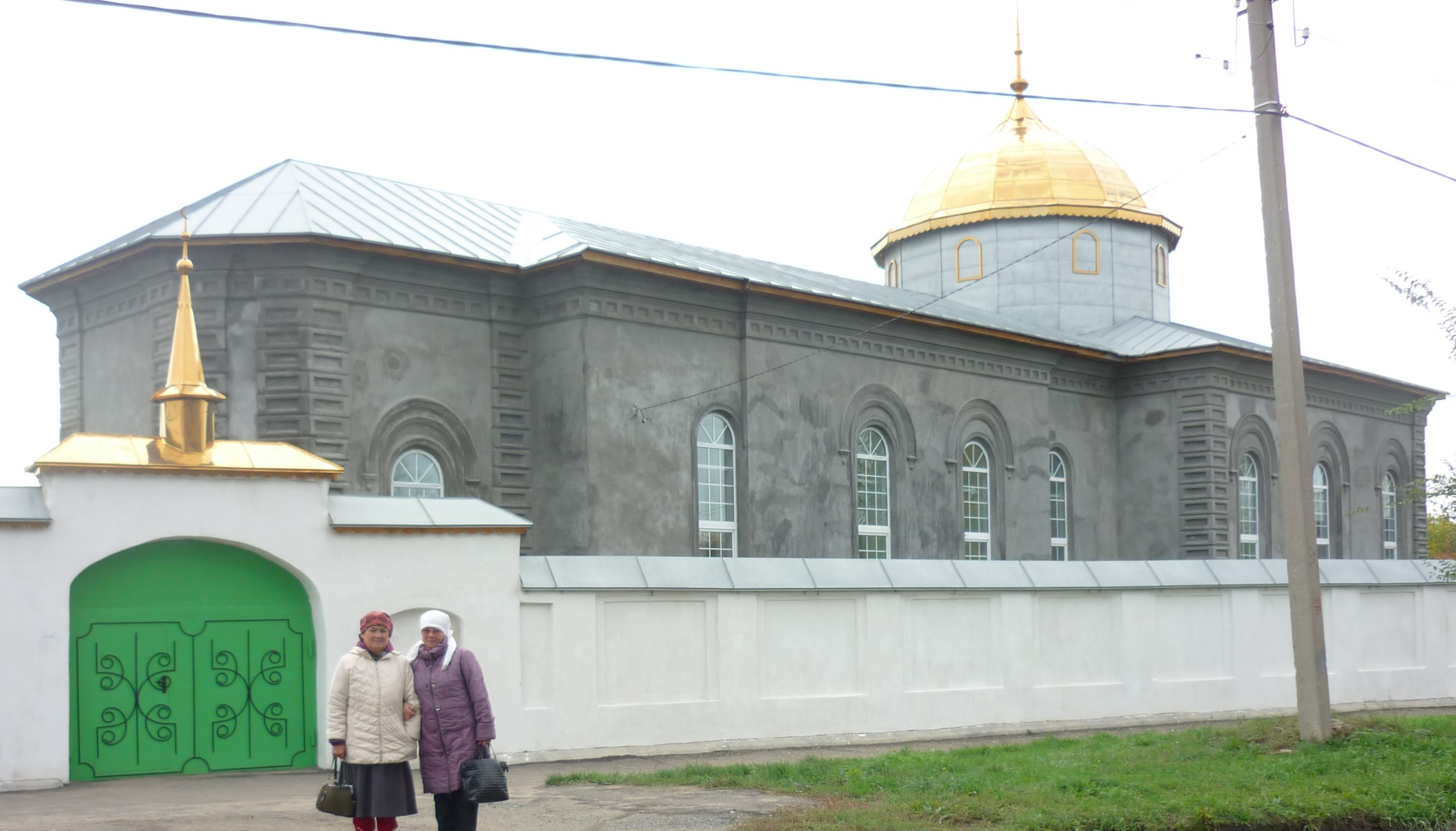 Башҡортса: Силәбе өлкәһе Троицк ҡалаһындағы Зәйнулла ишан мәсете